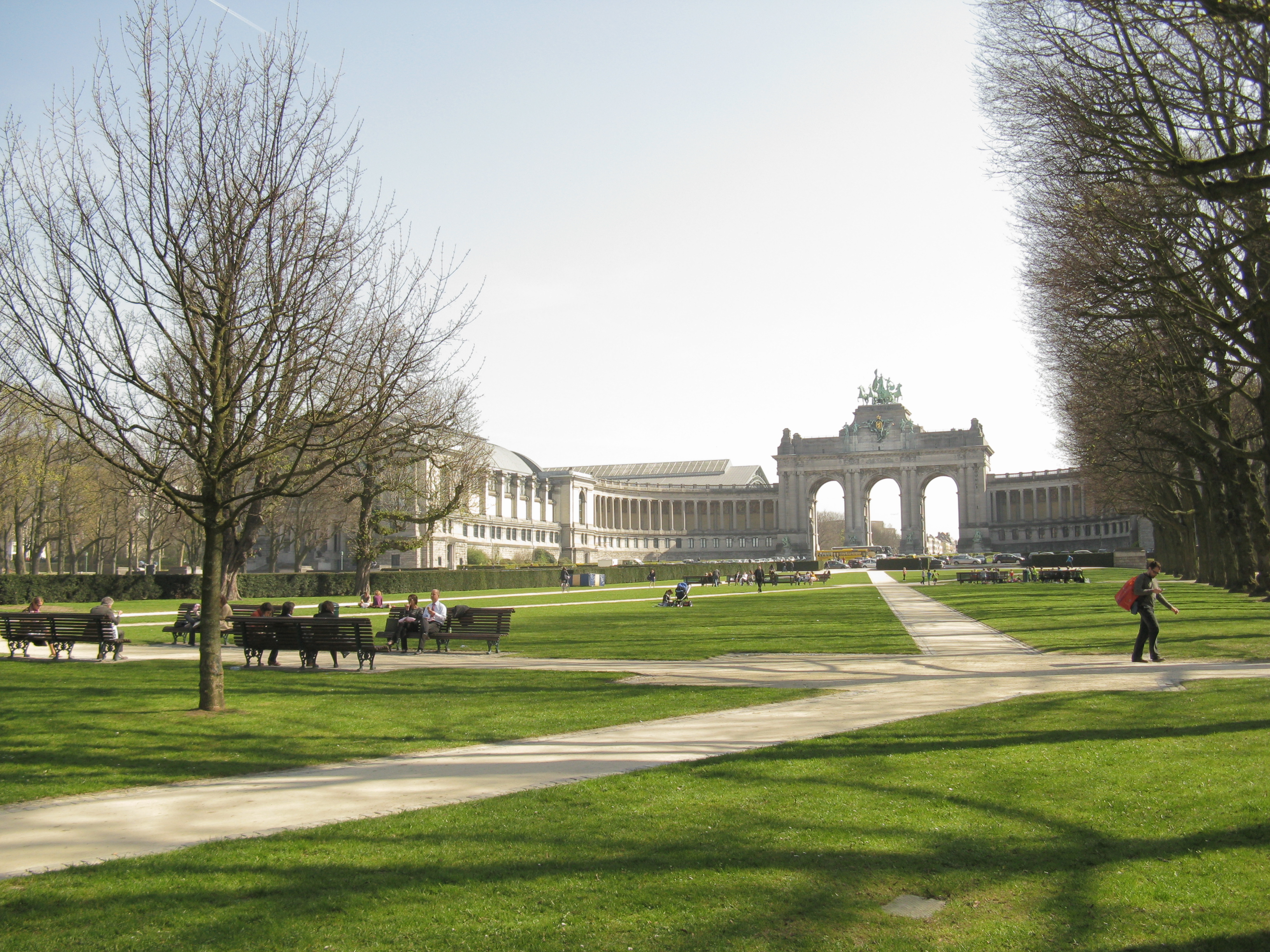 Jubelpark, Brussel